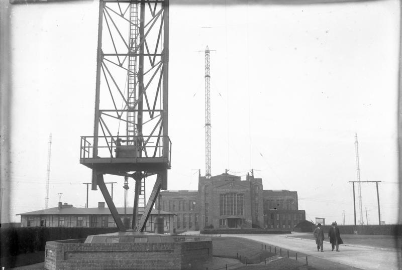 Die Reichspost kauft die Grossfunk-Station Nauen! Blick auf das Hauptgebäude der Grossfunkstation Nauen mit ihren Funktürmen. Als Kaufpreis für diese Anlage werden 28 Millionen Mark genannt.